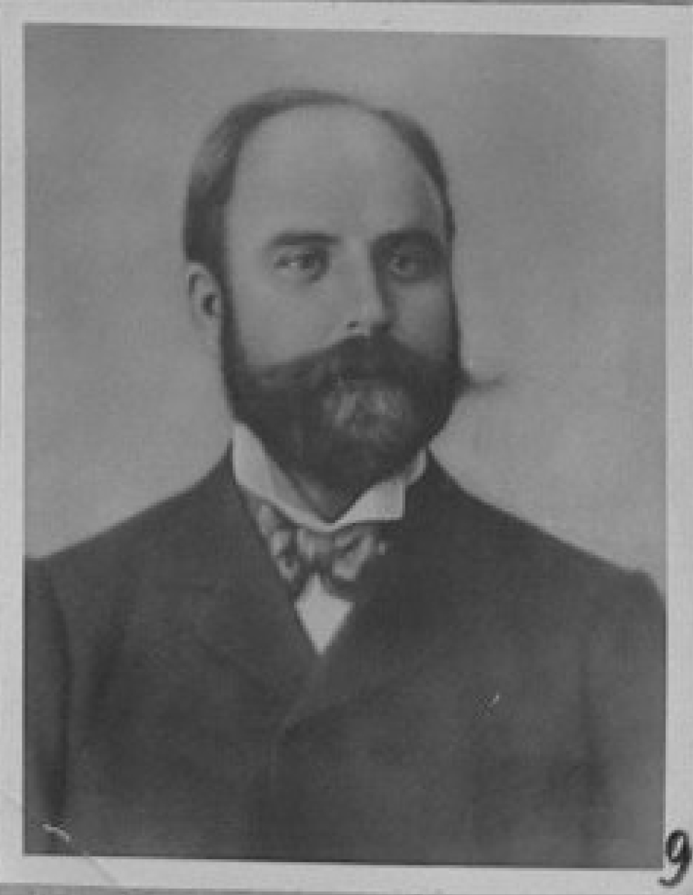 Български Лазар Маджаров (1872-1907) - български революционер Deutsch Lazar Madscharow (1872-1907) - bulgarischer Revolutionär